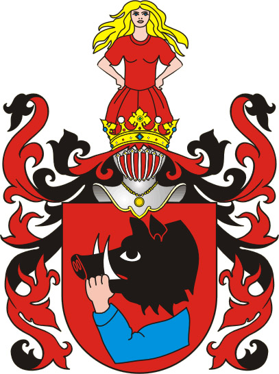 Herb Świnka Swinka Clan